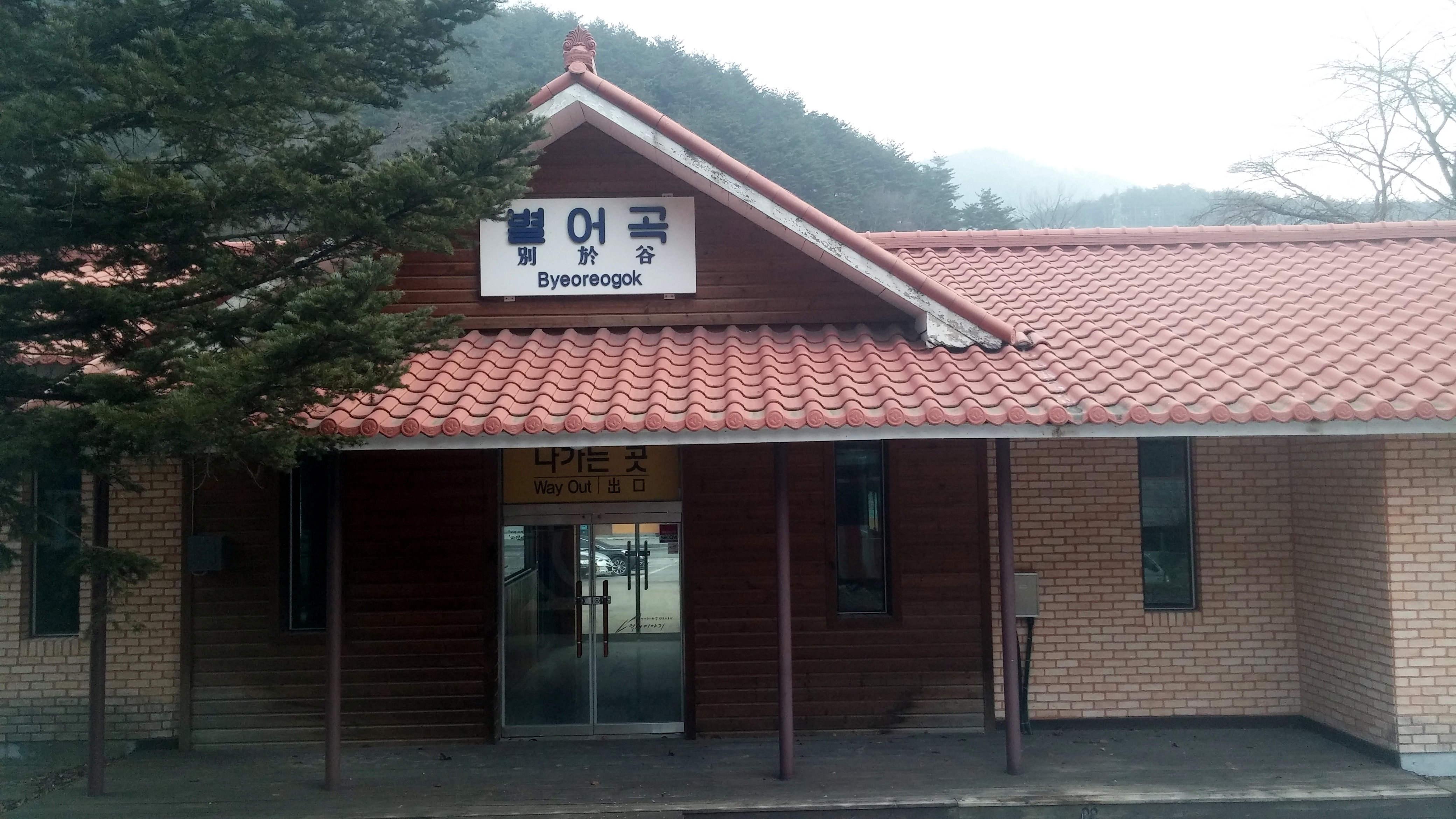 한국철도공사 별어곡역 역사(선로측)